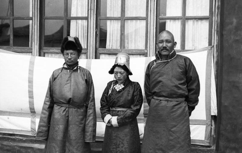 Tibetexpedition, Möndro, Frau Lungshar Lhasa, Möndro und Frau Lungscha [Von links nach rechts: k. A., Frau Lungshar, Möndro (Möndo)]